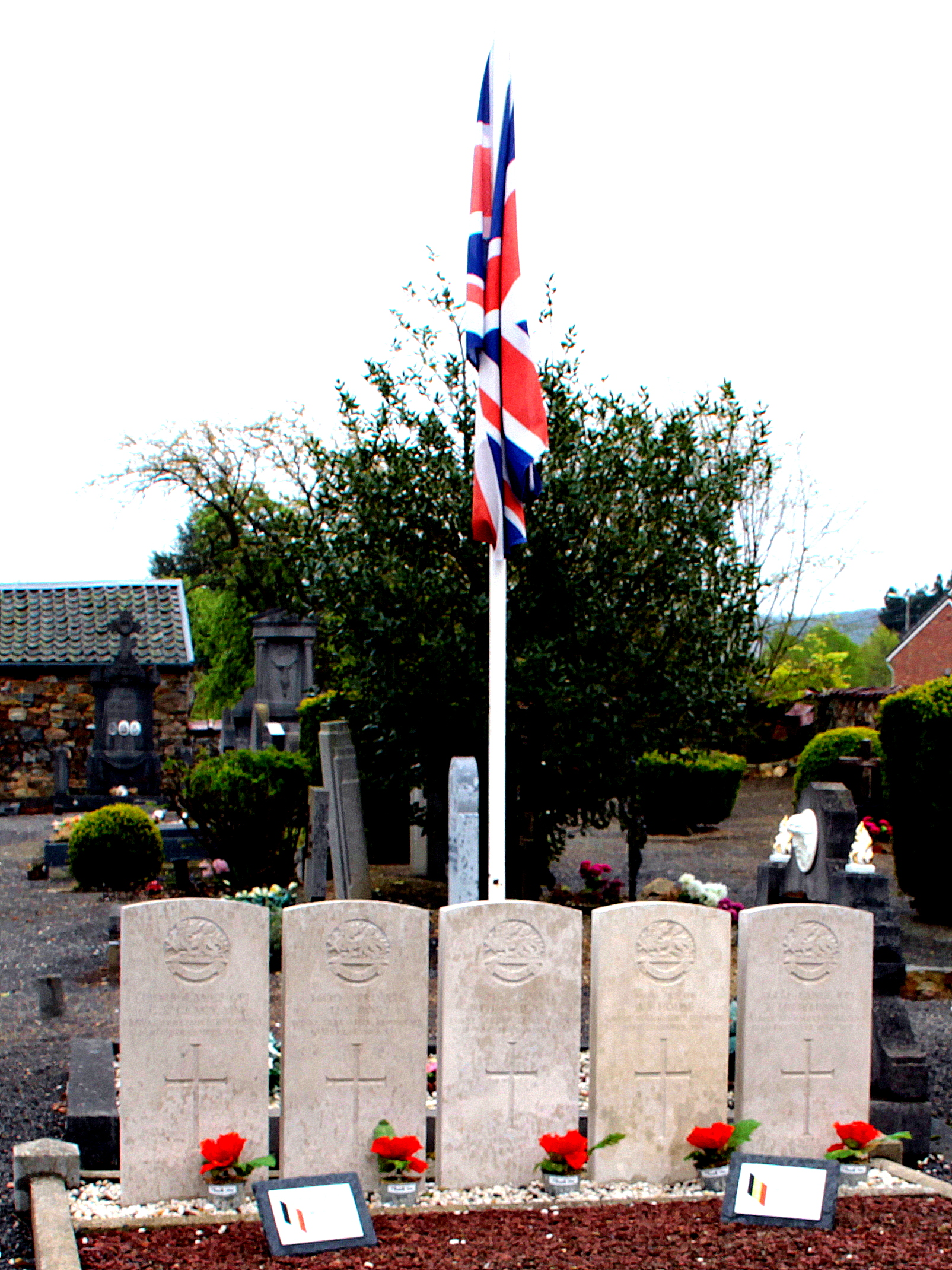 Commonwealthgriewer um Kierfecht vun Haute-Desnié